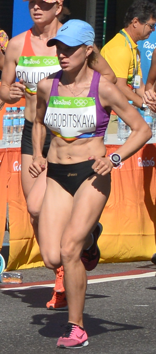 Passage du marathon des jeux olympiques de Rio 2016 dans le centre de Rio